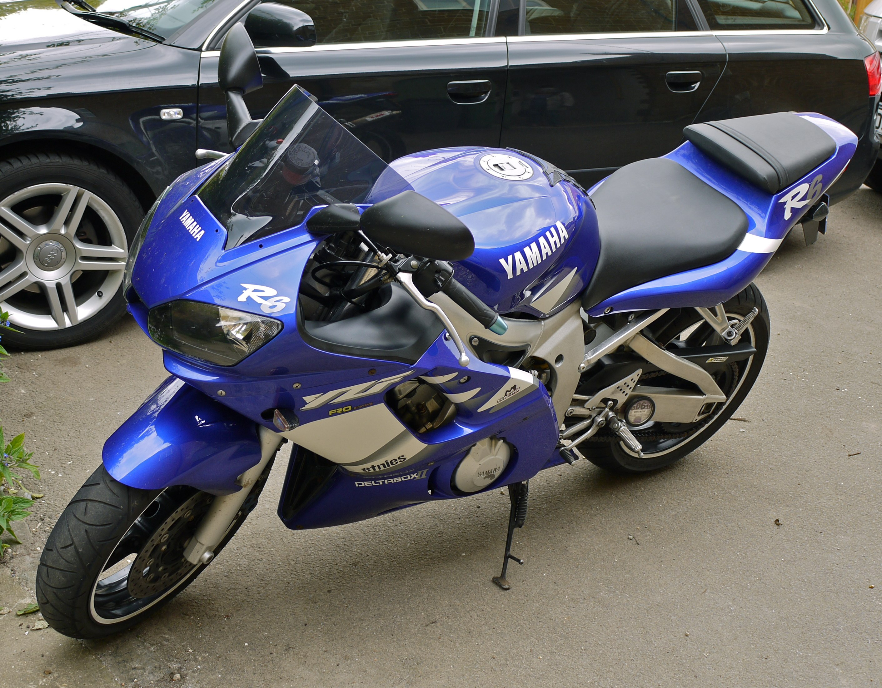 Panasonic G1 14-45 Lens